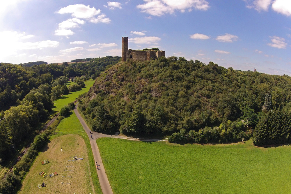 Burg Ardeck bei Holzheim